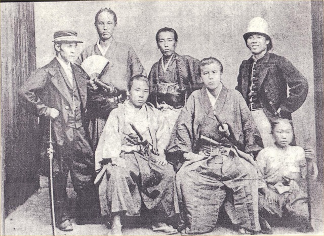 明治3年撮影。